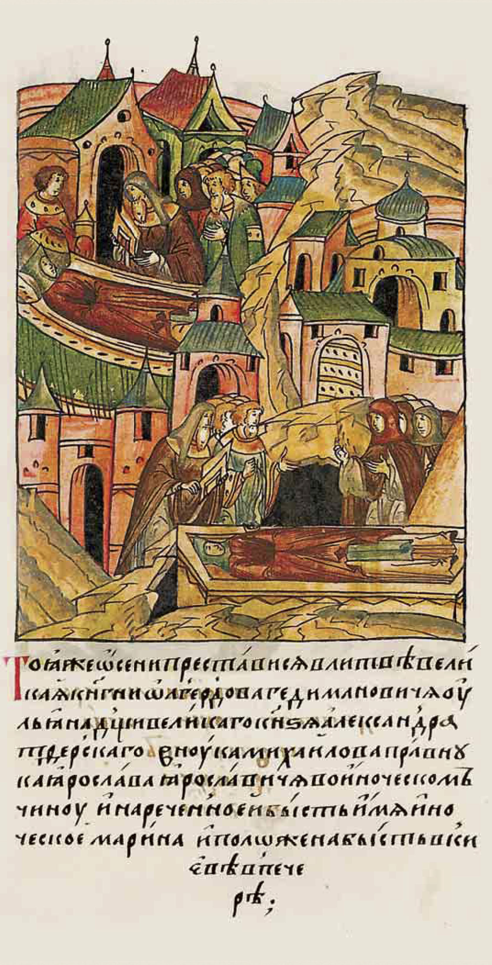 ЛИЦЕВОЙ ЛЕТОПИСНЫЙ СВОД: В ту же осень преставилась в Литве великая княгиня Ольгерда Гедиминовича — Ульяна, дочь великого князя Александра Тверского, внучка Михаила, правнучка Ярослава Ярославича, в иночестве нареченная Марина, и похоронена была в Киеве в Печерской Лавре.